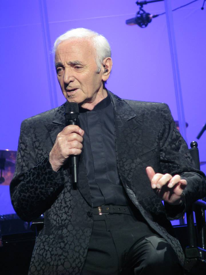 Charles Aznavour (b. May 22, 1924) – French singer